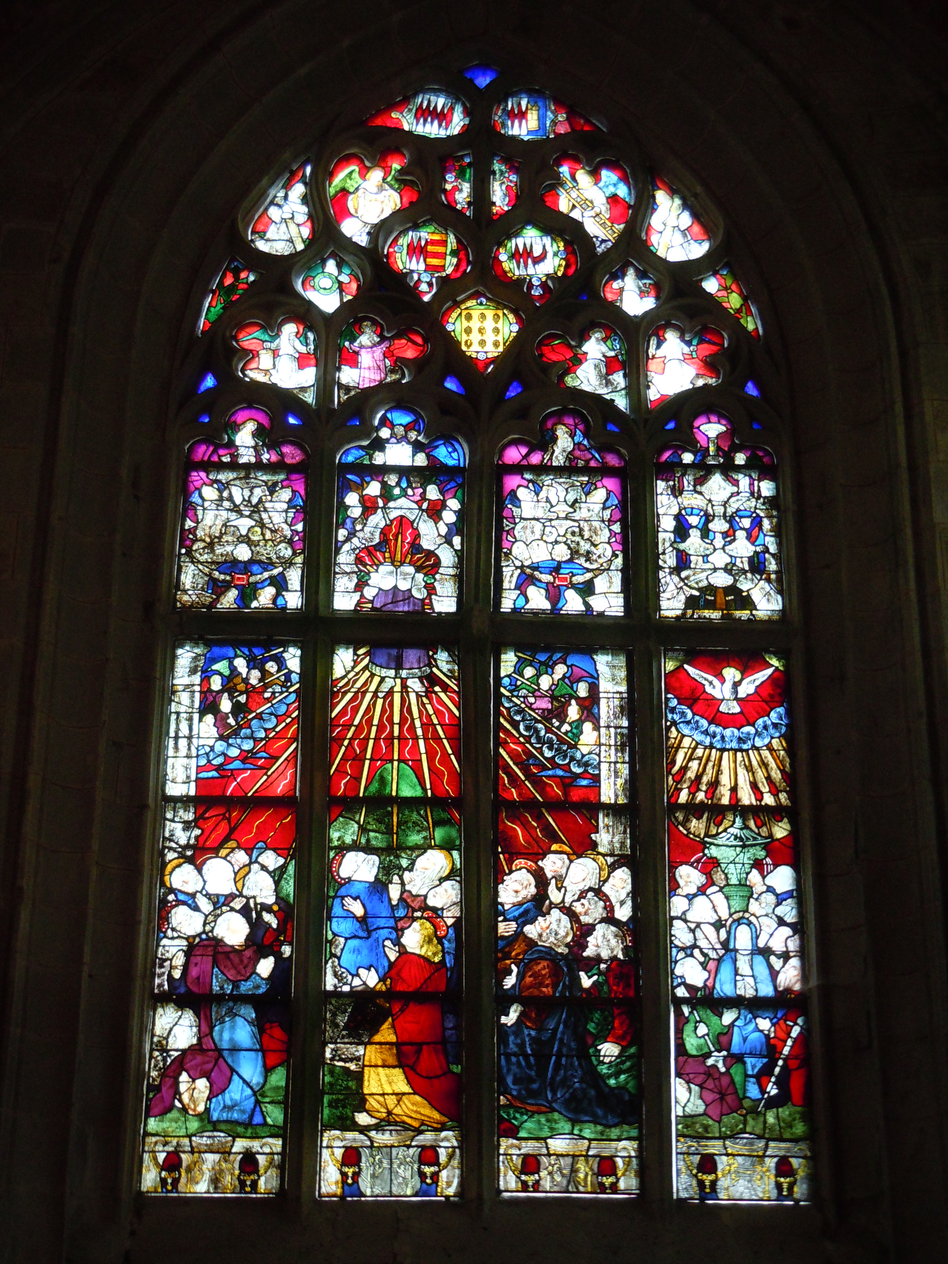 vitrail de l'Ascension et de la Pentecôte, chapelle Sainte-Barbe, Le Faouët, département du Morbihan, France